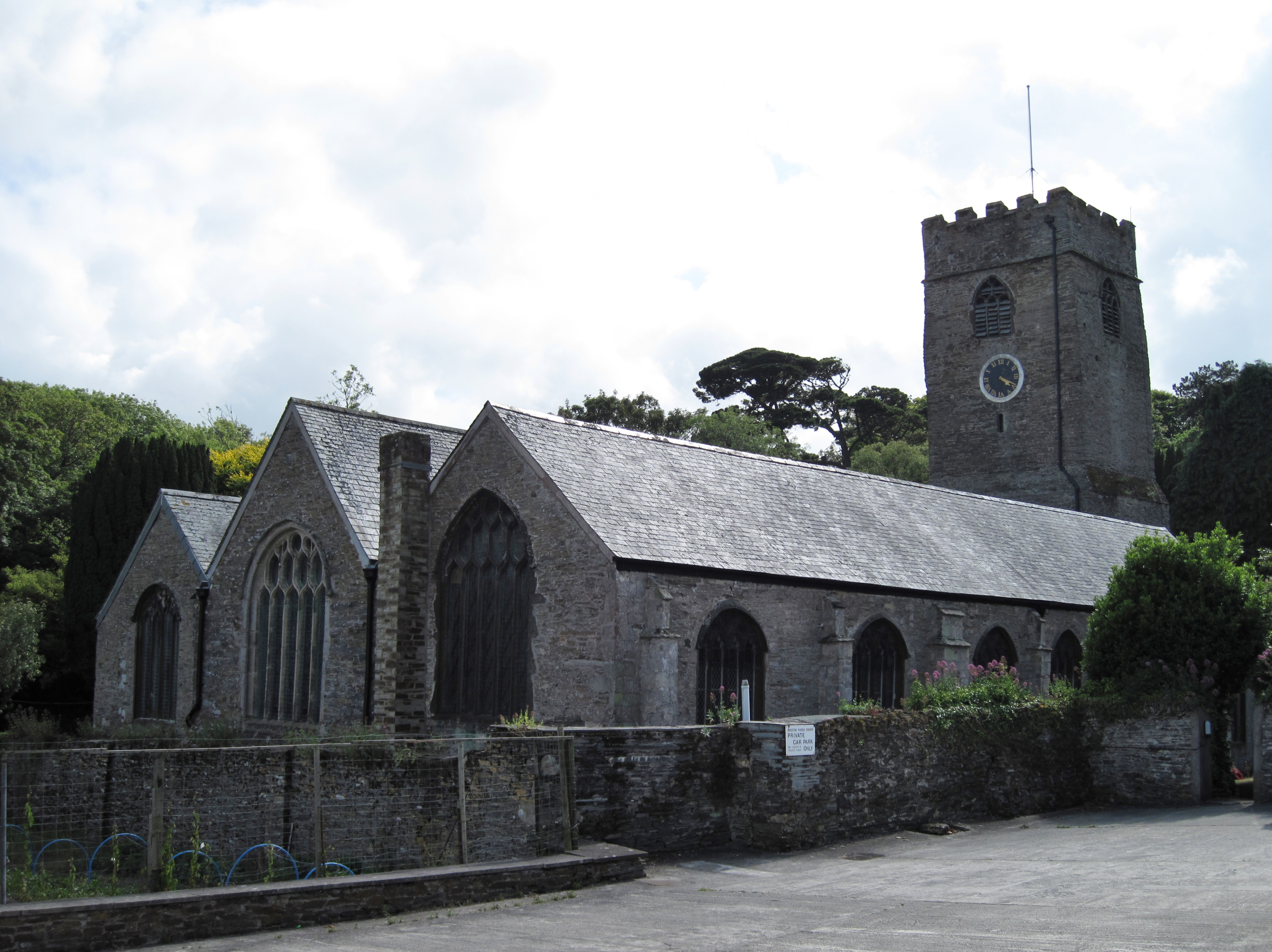 Kirche St. Petroc in Padstow, Cornwall, Großbritannien